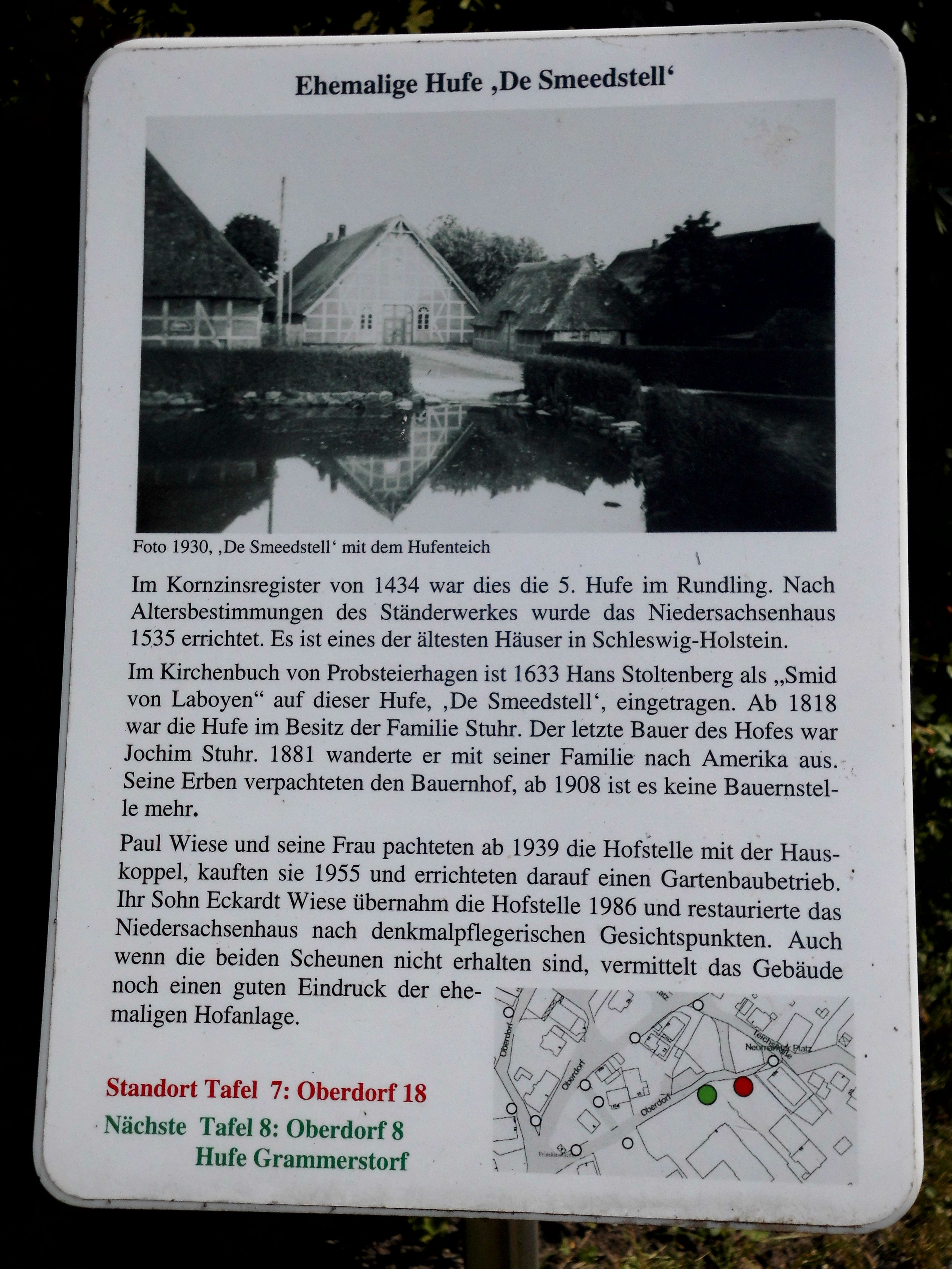 Hinweisschild vor dem Haus Oberdorf 18 in Laboe. Siehe auch Gesamtaufnahme des Hauses.